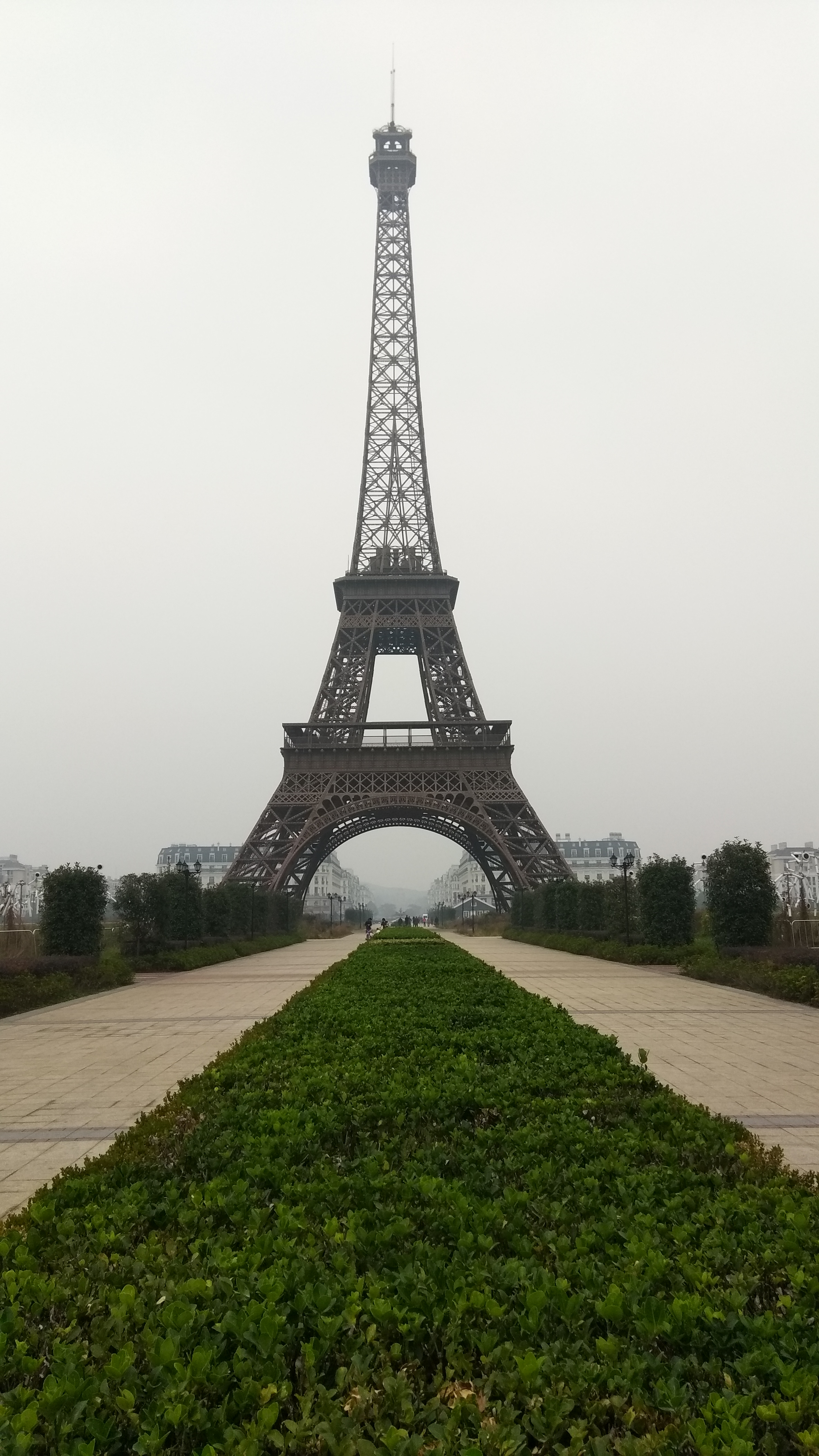 Eiffel Tower at Tianducheng, Hangzhou